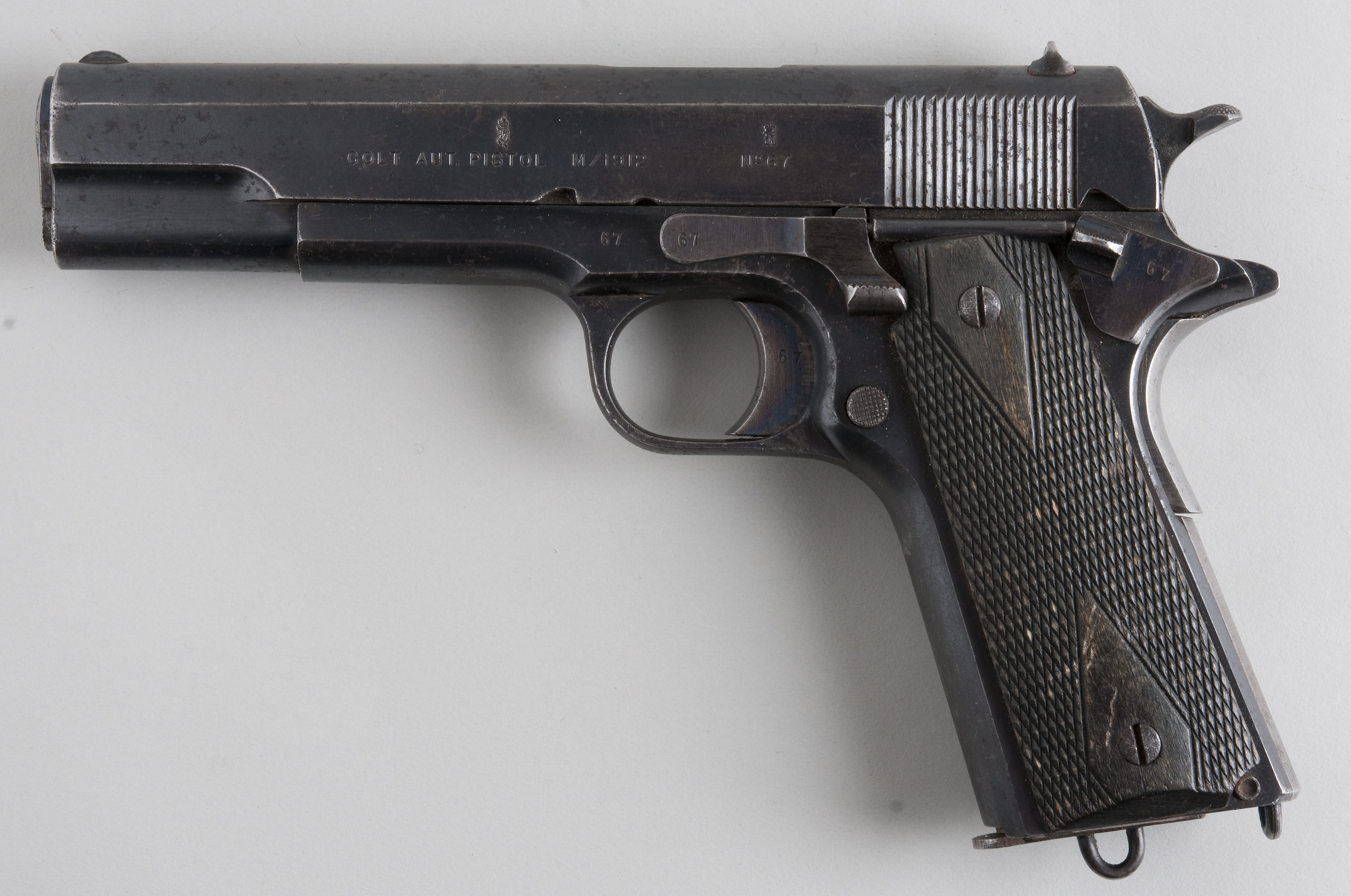 Colt 1912 From flickr user handvapensamlingen - Pistols used in Norway.